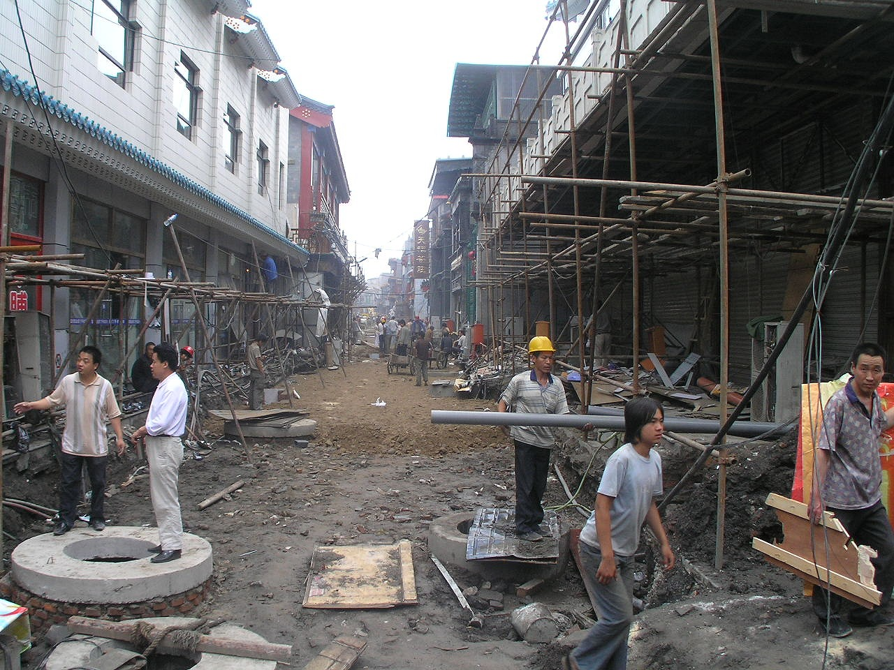 開発が進む北京の下町 开发前进的北京的低洼的手工业者居住区